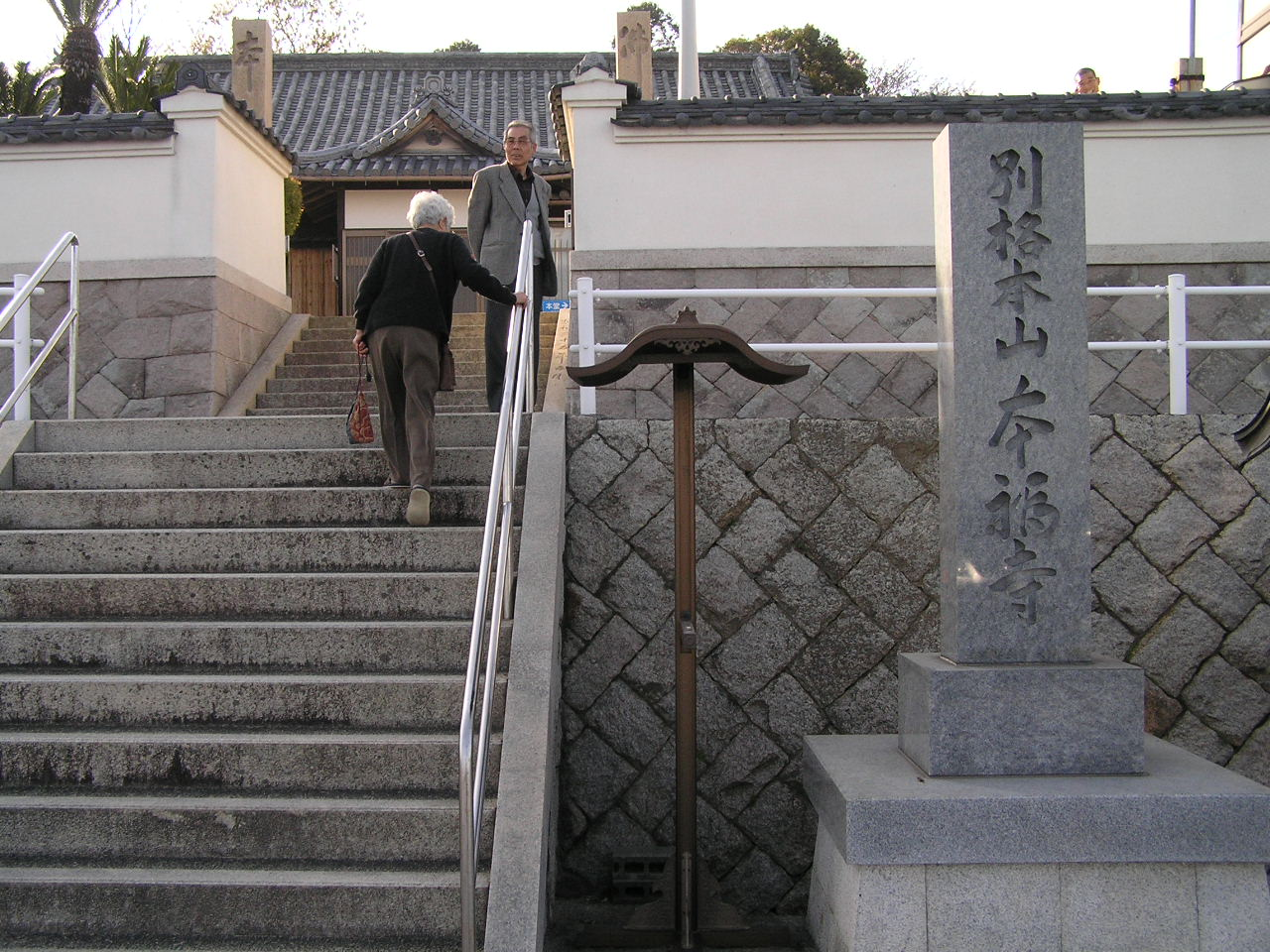 本福寺水御堂（ほんぷくじみずみどう） 本福寺は、平安時代後期に創建された真言密教の寺院で真言宗別格本山。水御堂はその本堂で1991年竣工の安藤忠雄設計による鉄筋コンクリート造の寺院建築。第34回建築業協会賞を受賞。 ～photo by Autumn Snake 【おぉたむ すねィく探検隊】写真部門 担当 大原佳苗